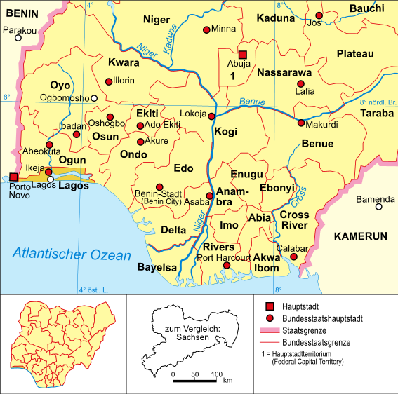 Politische Karte Nigerias (Bundesstaat Lagos hervorgehoben)